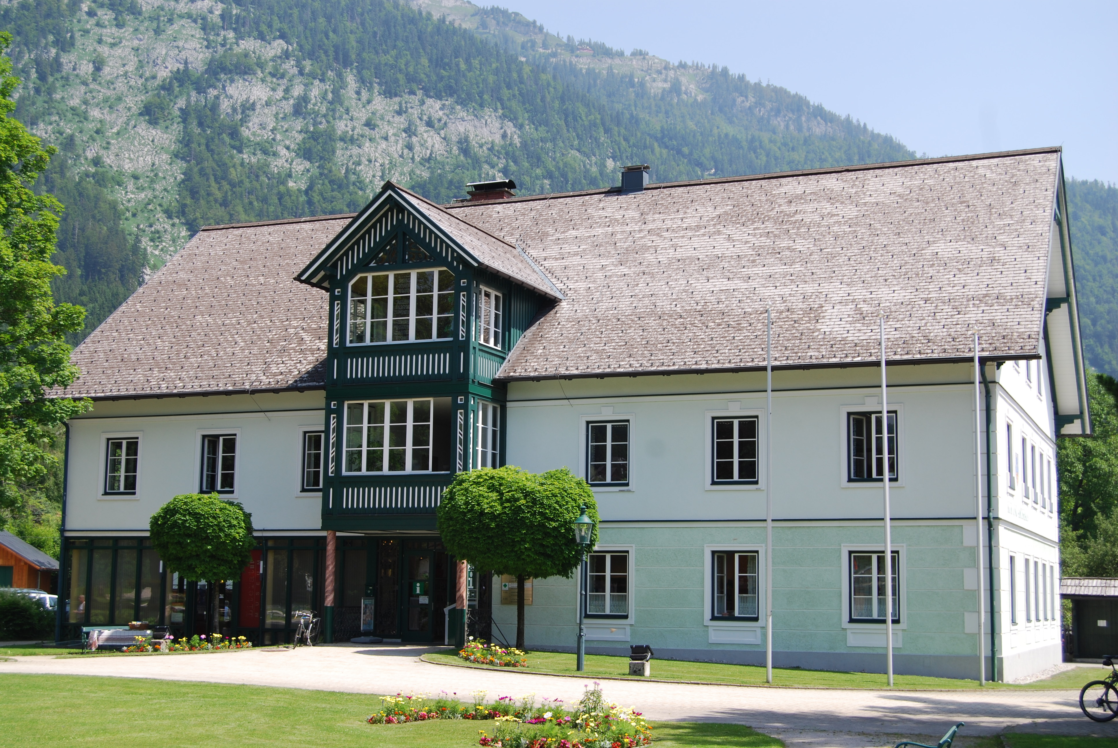 Kur- und Amtshaus